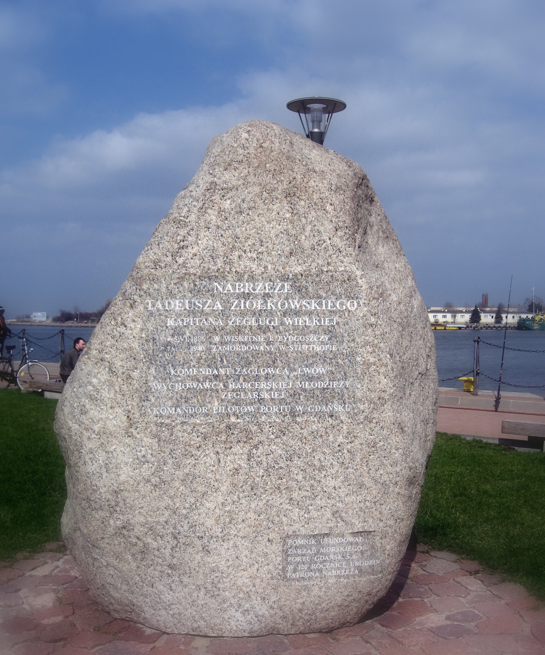 Kamień pamiątkowy na Nabrzeżu Ziółkowskiego w Gdańsku-Nowym Porcie